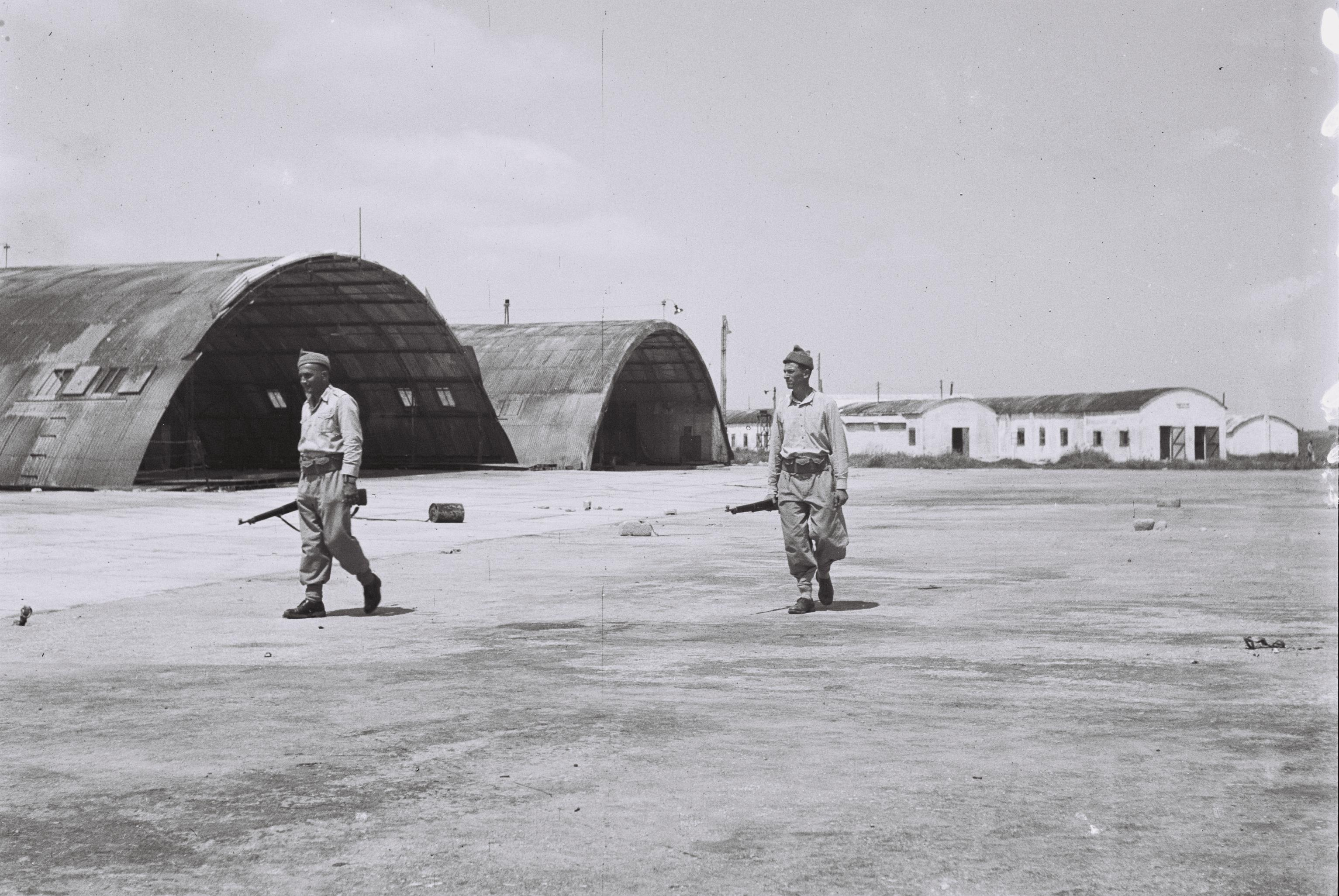 חברי הגנה שומרים על מחנה סירקין.